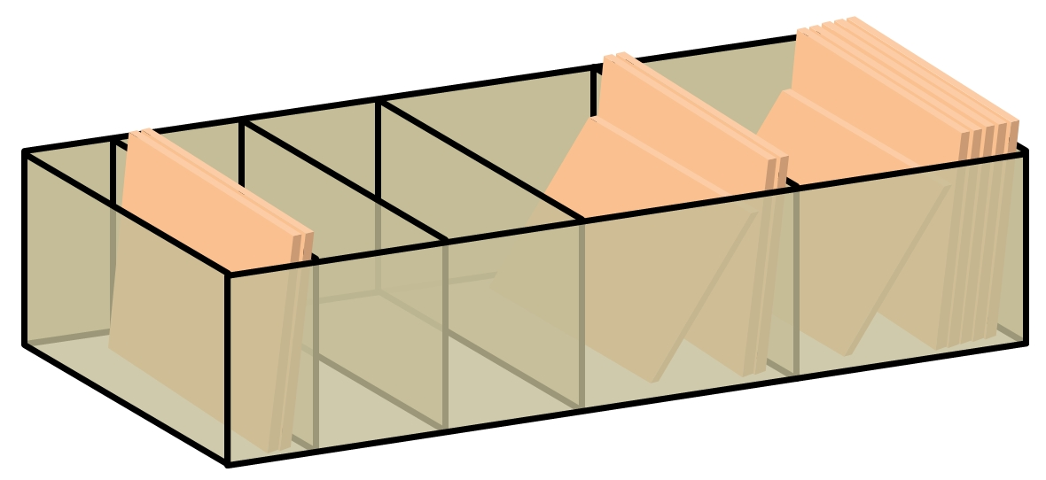 Mit Microsoft Word 2010 erstellte Pixel-Grafik mit einer schematischen Darstellung eines halbtransparenten Lernkarteikastens mit 5 Fächern.